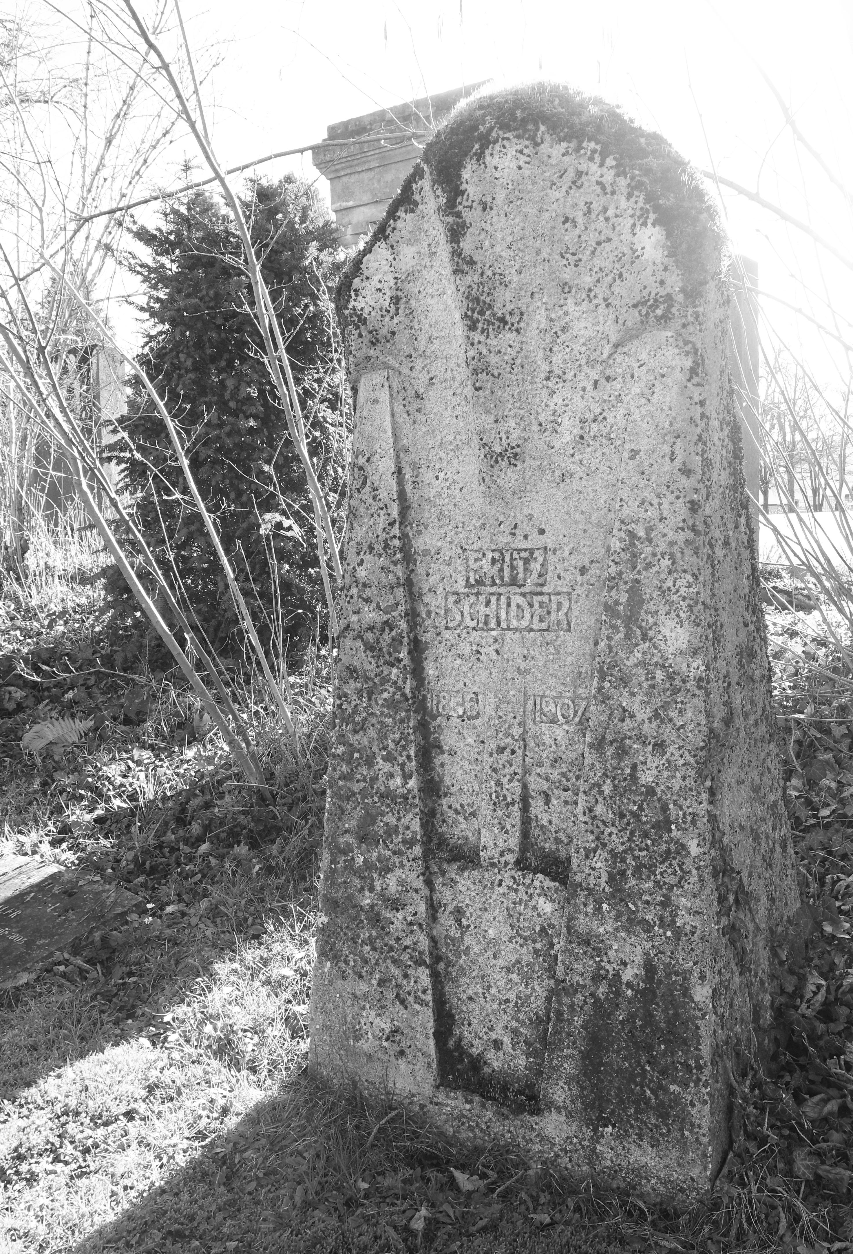 Fritz Schider (1846–1907) Maler. Lehrer an der gesellschaftseigenen Zeichen- und Modellierschule in Basel. Grab auf dem Friedhof Wolfgottesacker, Basel